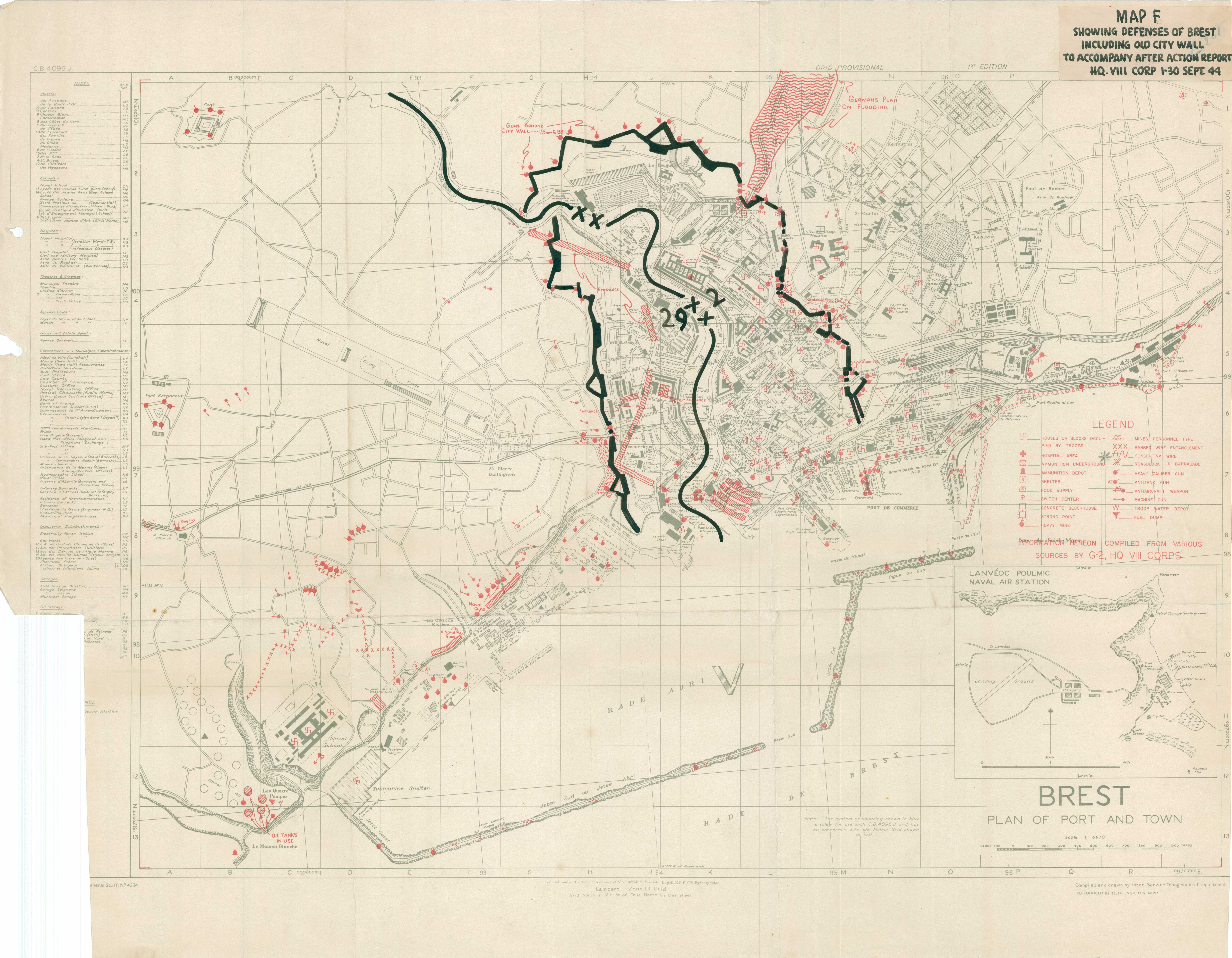 Plan des défense de la ville de Brest